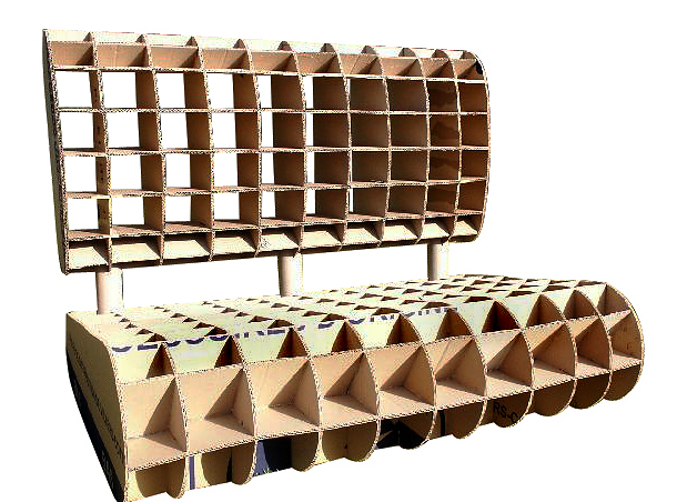 Meuble en carton - Canape 70's en cours de construction